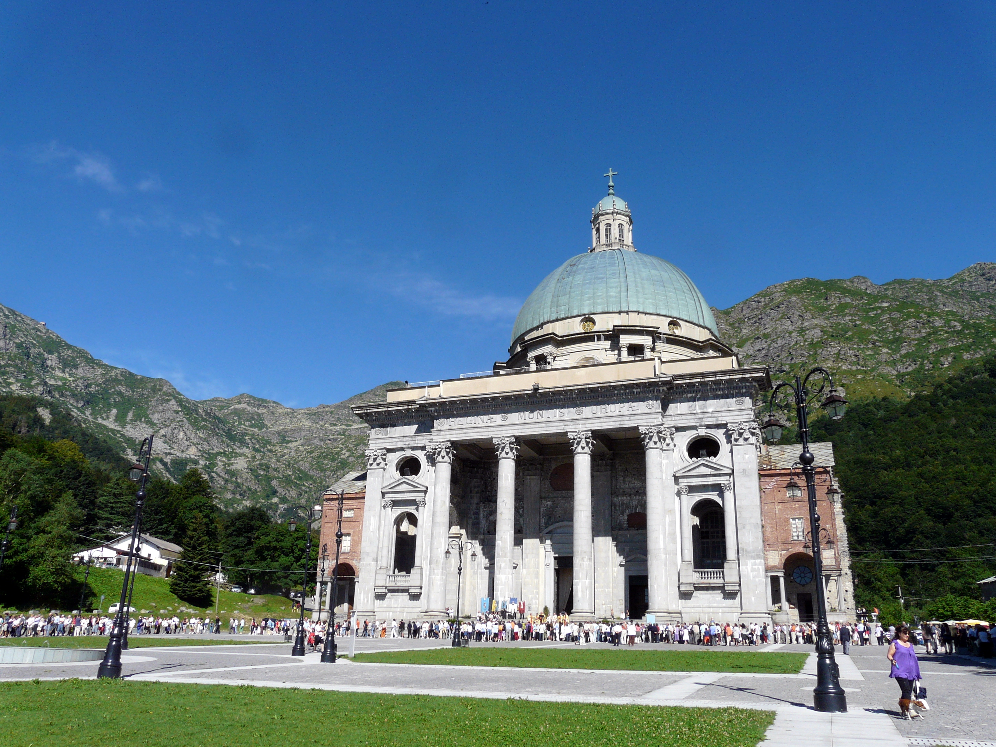 Serie di immagini del Santuario di Oropa, Piemonte, Italia